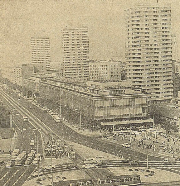 Warszawa, Centrum